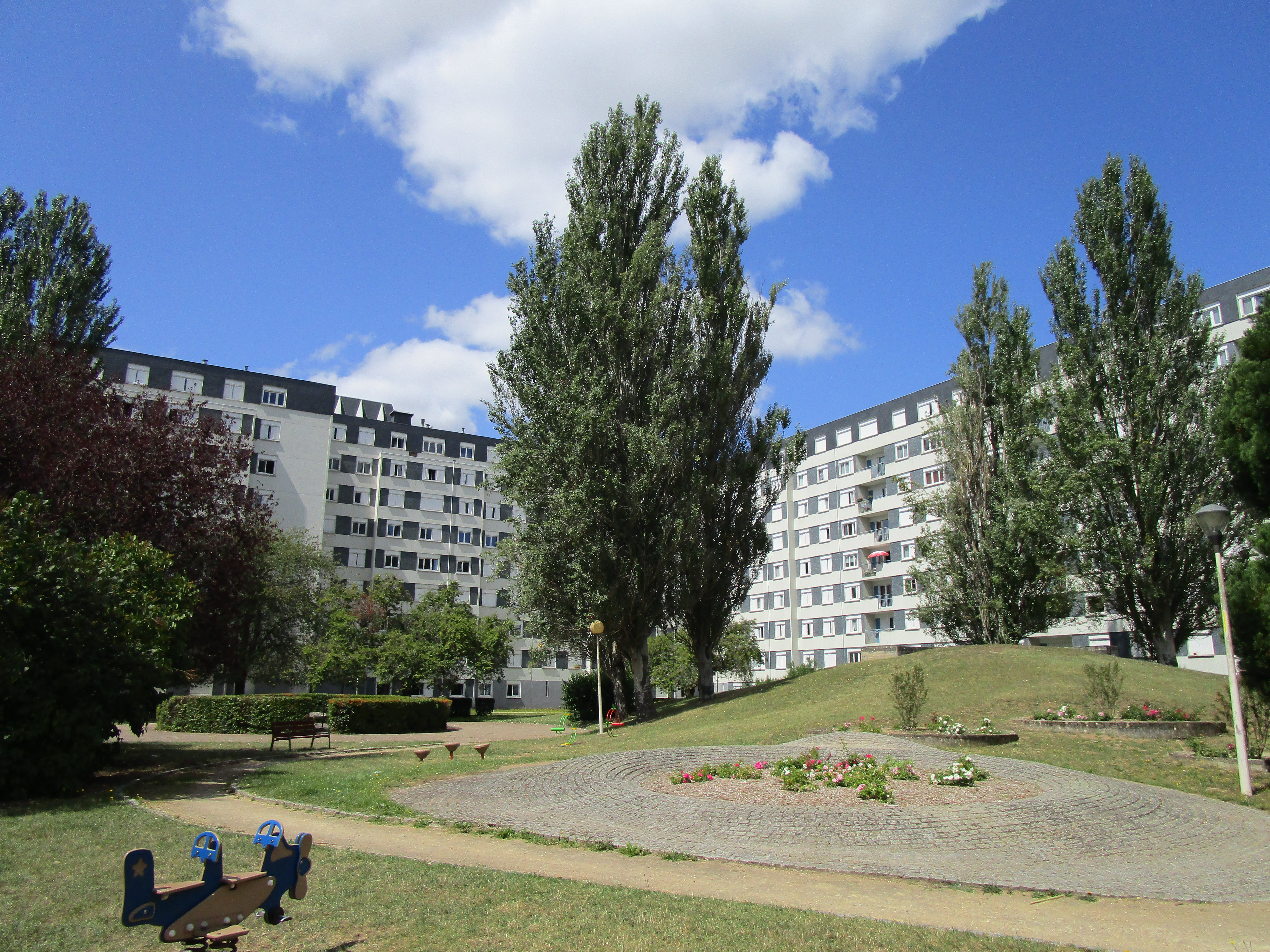 Barres d'immeubles et square Adolphe Adam, dans le quartier des Fontaines de Tours.